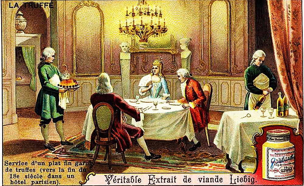 Service d'un plat fin garni de truffes vers la fin du XVIIIe siècle dans un hôtel parisien